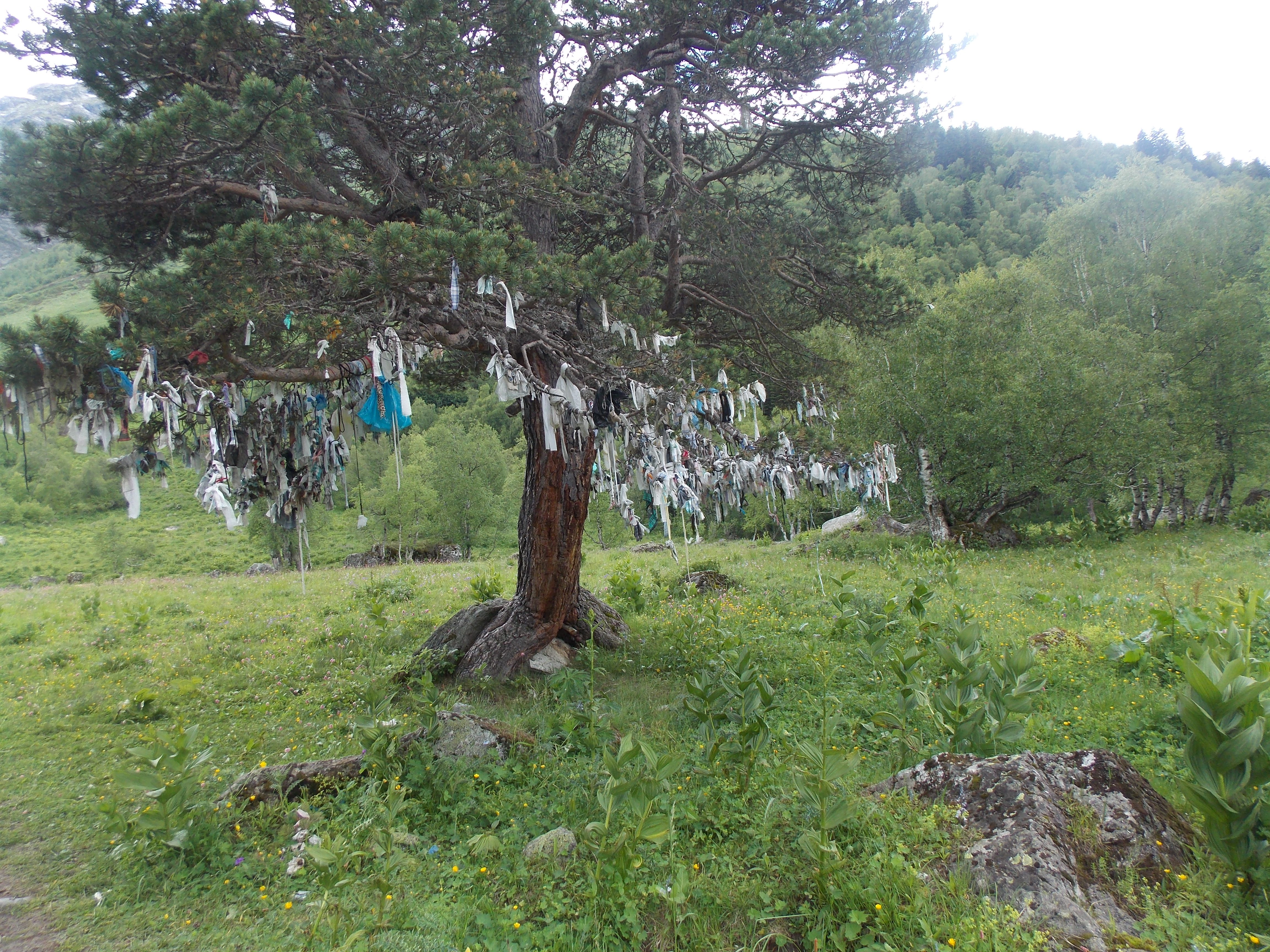 Архызский заказник, Зеленчукский район This image is related to the protected area of Russia number 0910003